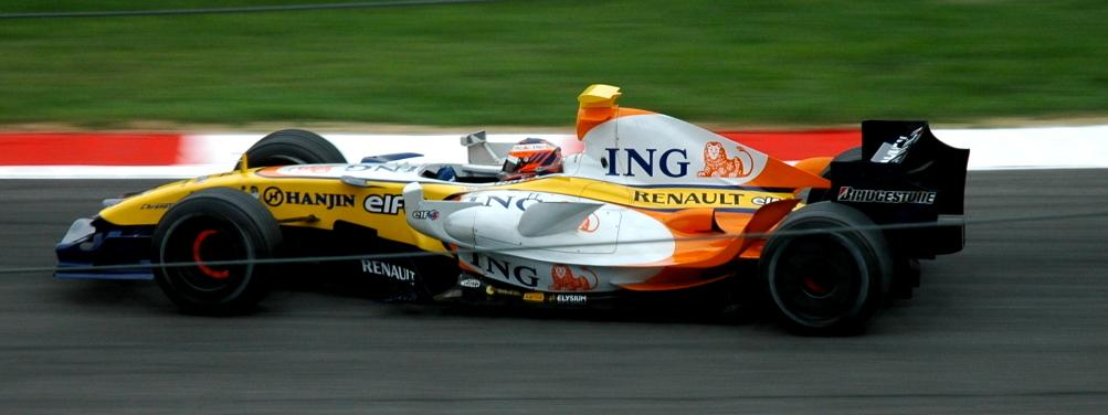 Heikki Kovalainen testing for Renault at Monza in 2007.